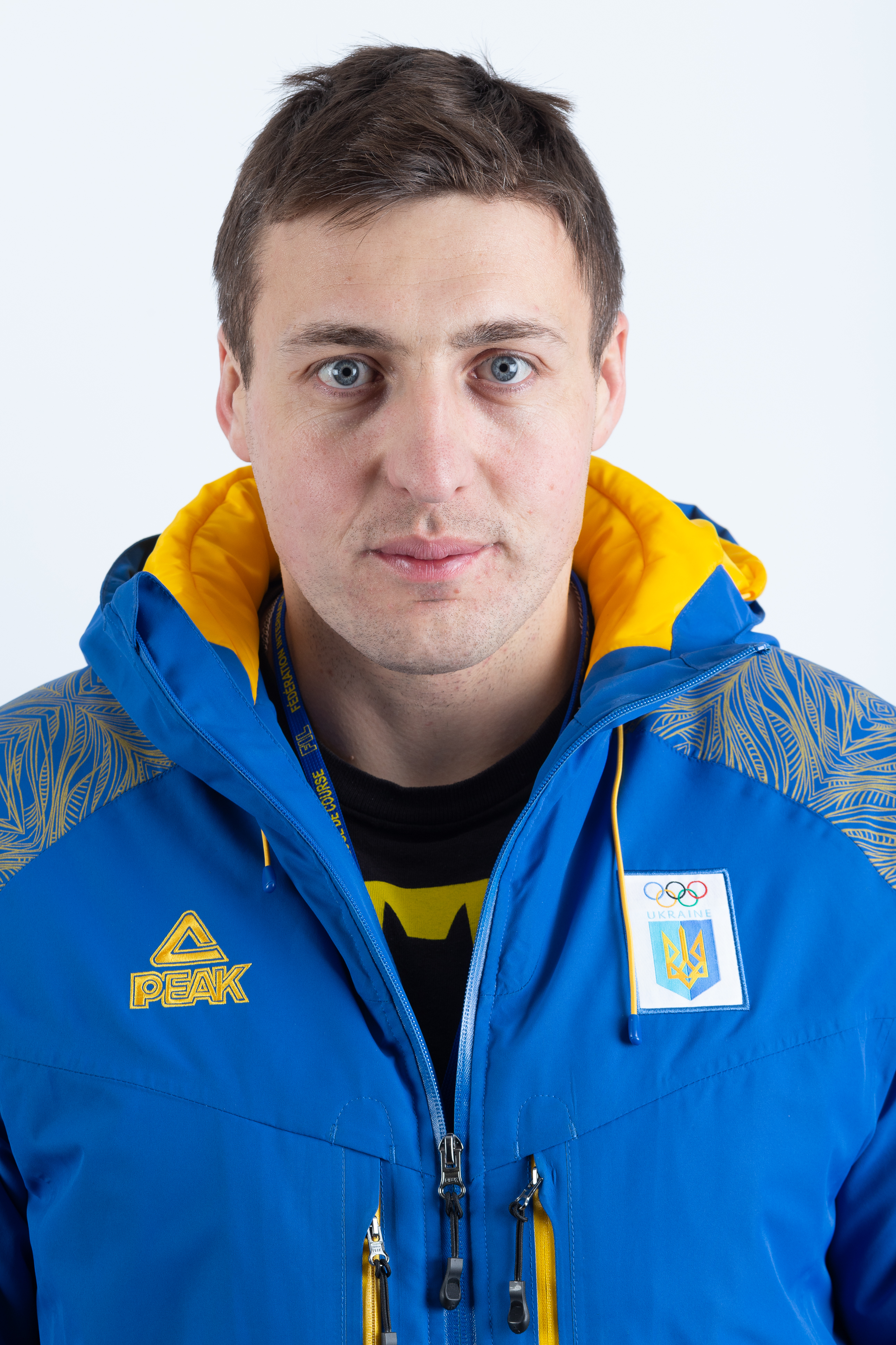 Mandziy, Andriy (UKR, Ukraine)